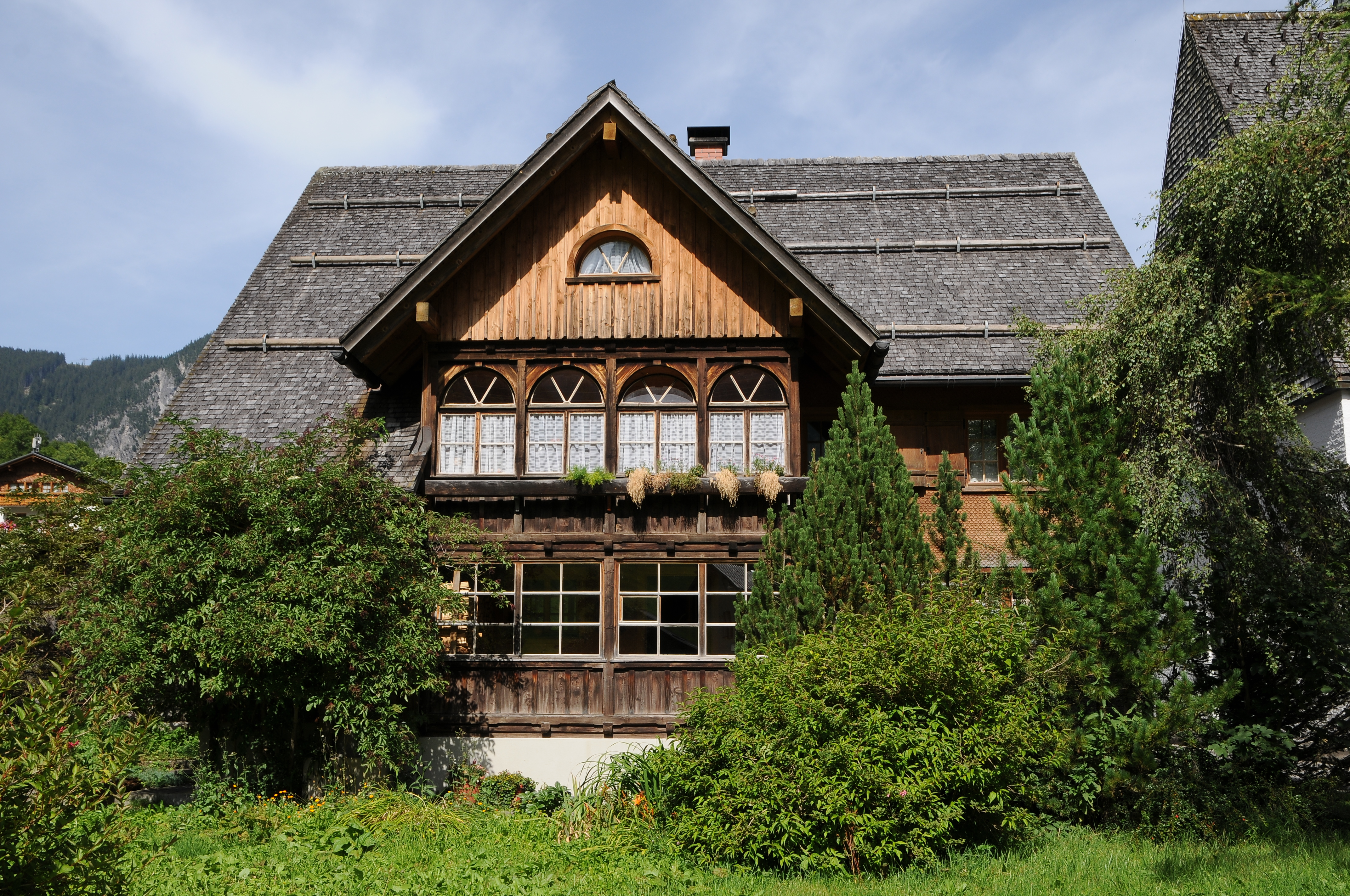 Pfarrhof, in Brand Nr.34